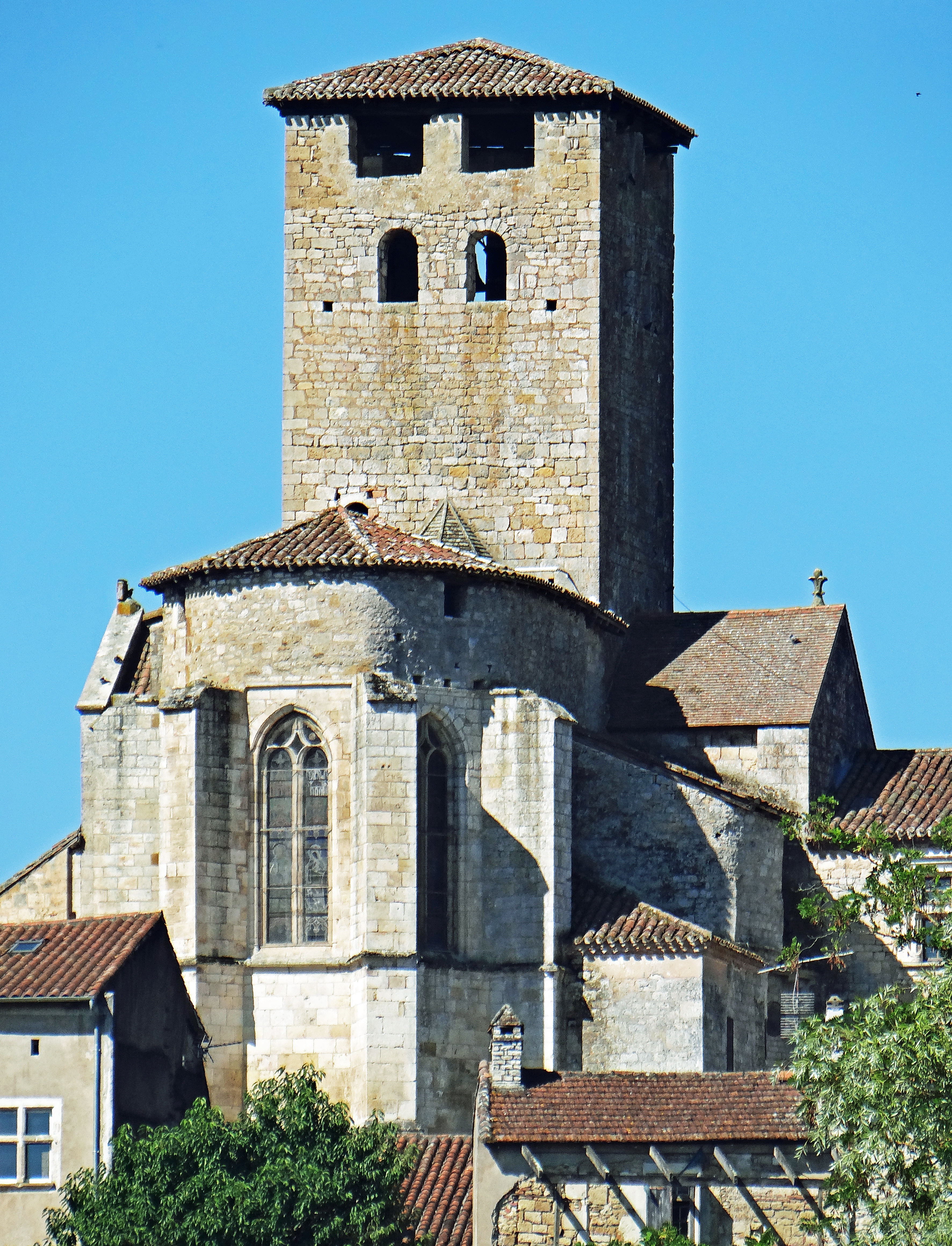 Monsempron-Libos - Prieuré Saint-Géraud - Chevet de l'église